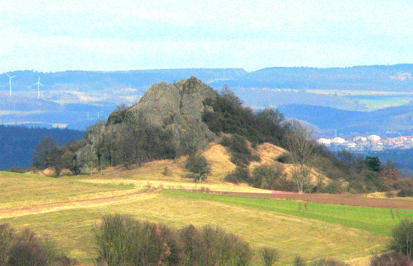 Gudensberg (Hessen), Basaltkegel „Scharfenstein“